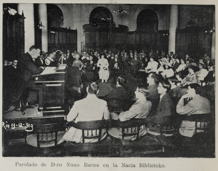 Parolado de Nuno Baena en la Nacia Biblioteko, en Rio-de-Ĵanejro, dum la 5-a Brazila Kongreso de Esperanto, en decembro 1913